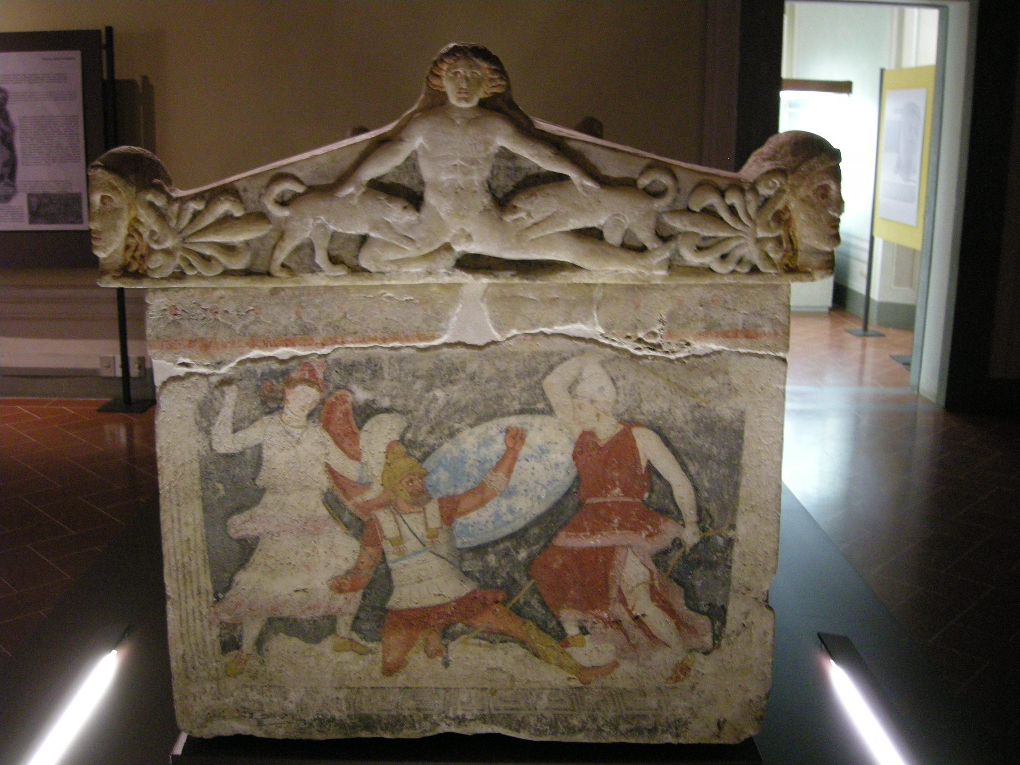 Sarcofago delle amazzoni, lato 2